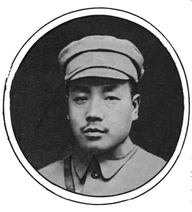 田頌堯，1930年的照片。